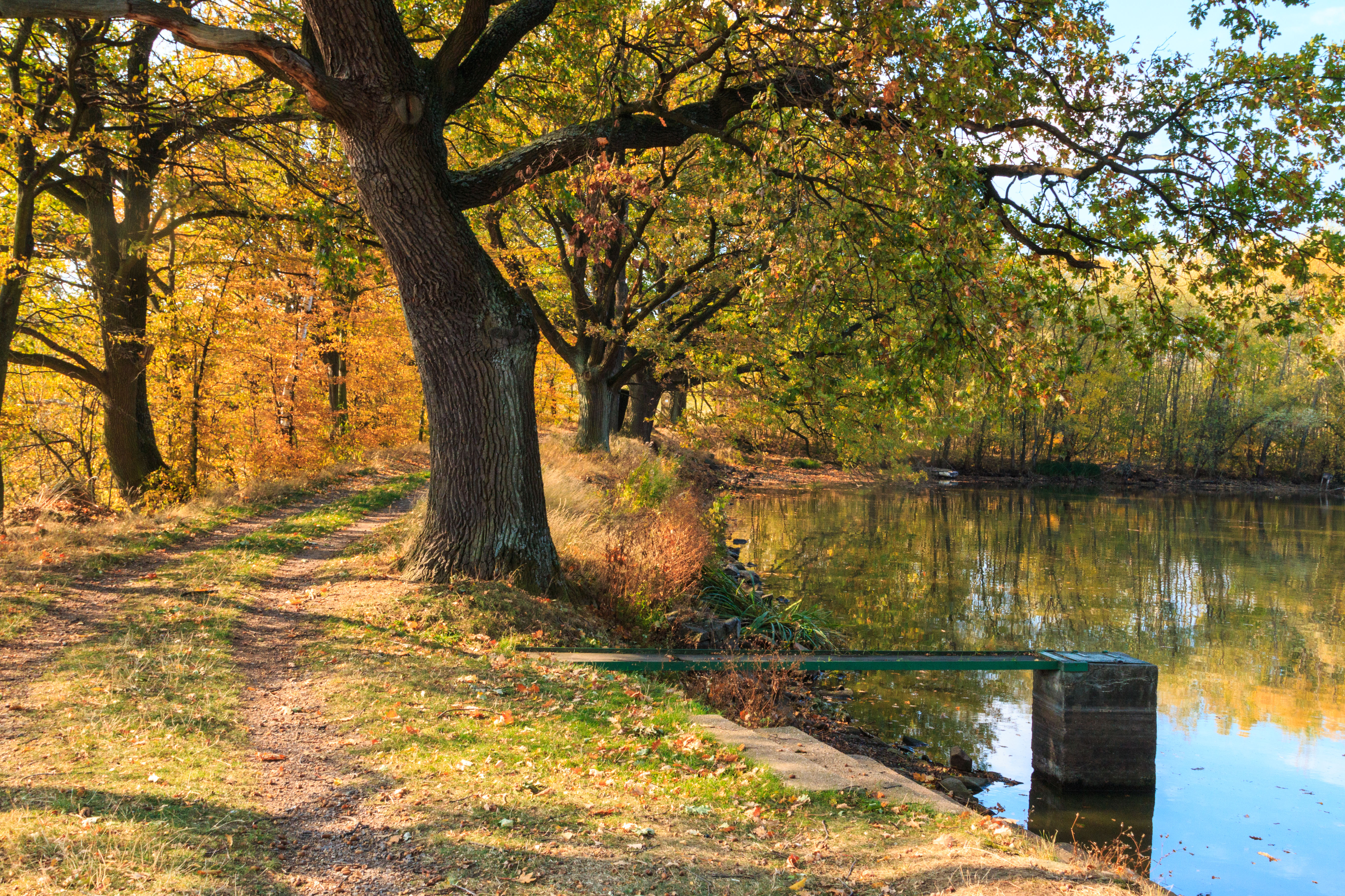 Drahotický rybník Project: Vodstvo. Ticket: 1618.